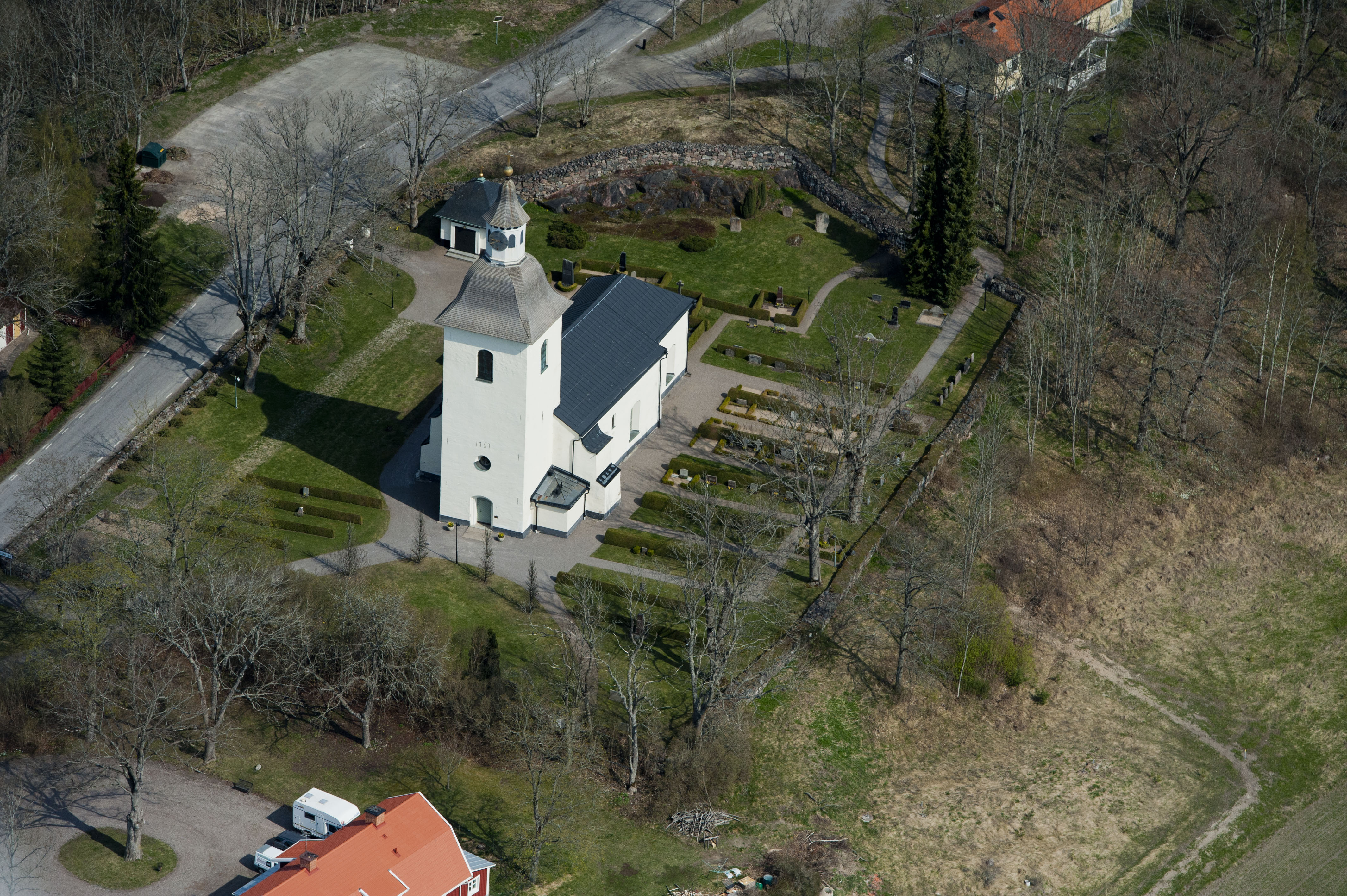 Tingstads kyrka